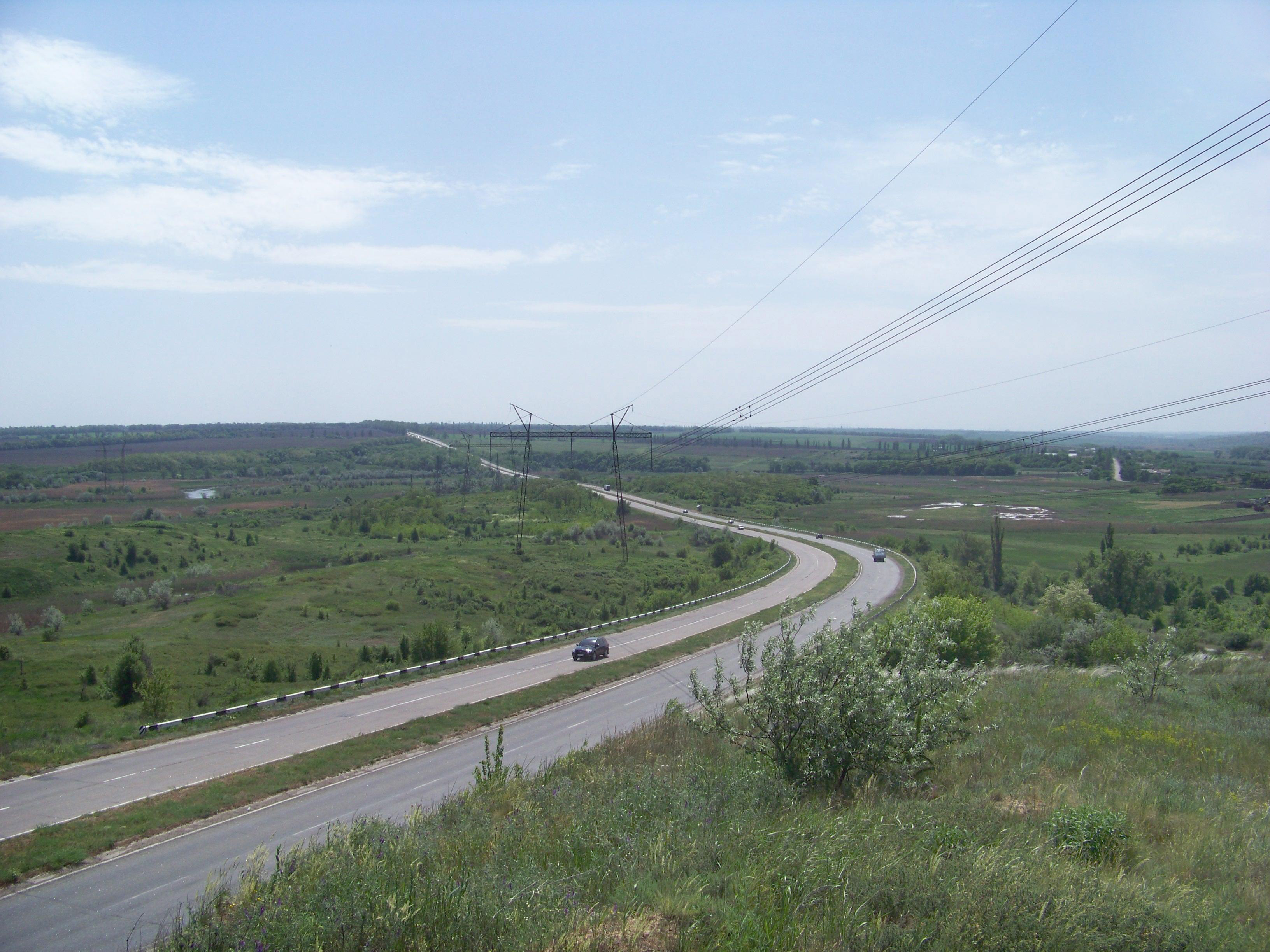 Автошлях Н 20 біля села Олександро-Калинове Костянтинівського району. Вид у бік Донецька.